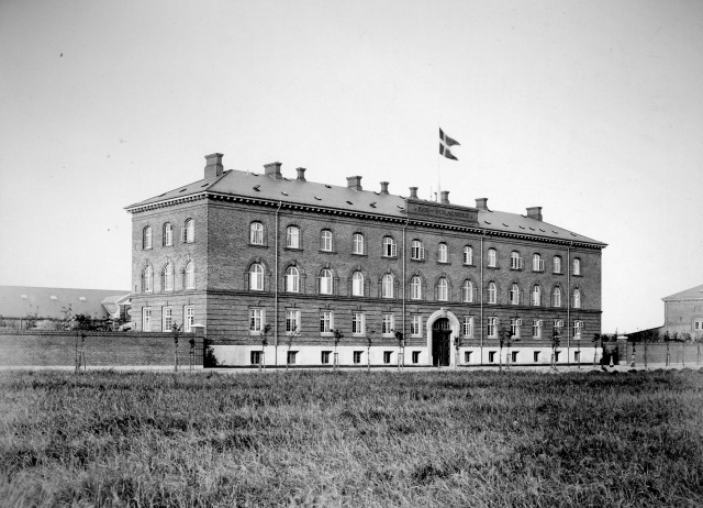 Rideskolen, or Ride- og Beslagskolen, former barracks in Frederiksberg. Statens Forsvarshistoriske Museum.